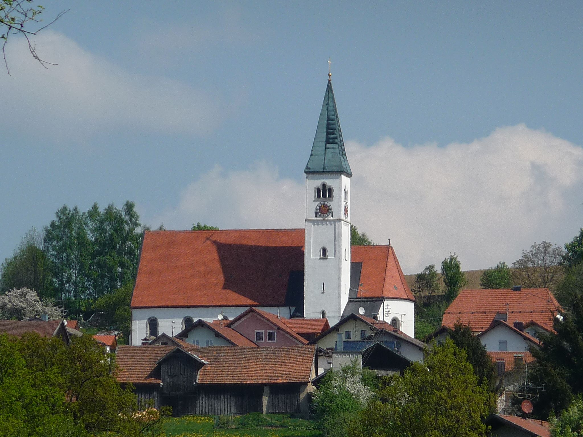 Die Pfarrkirche Sieben Schmerzen Mariä in Wildenranna